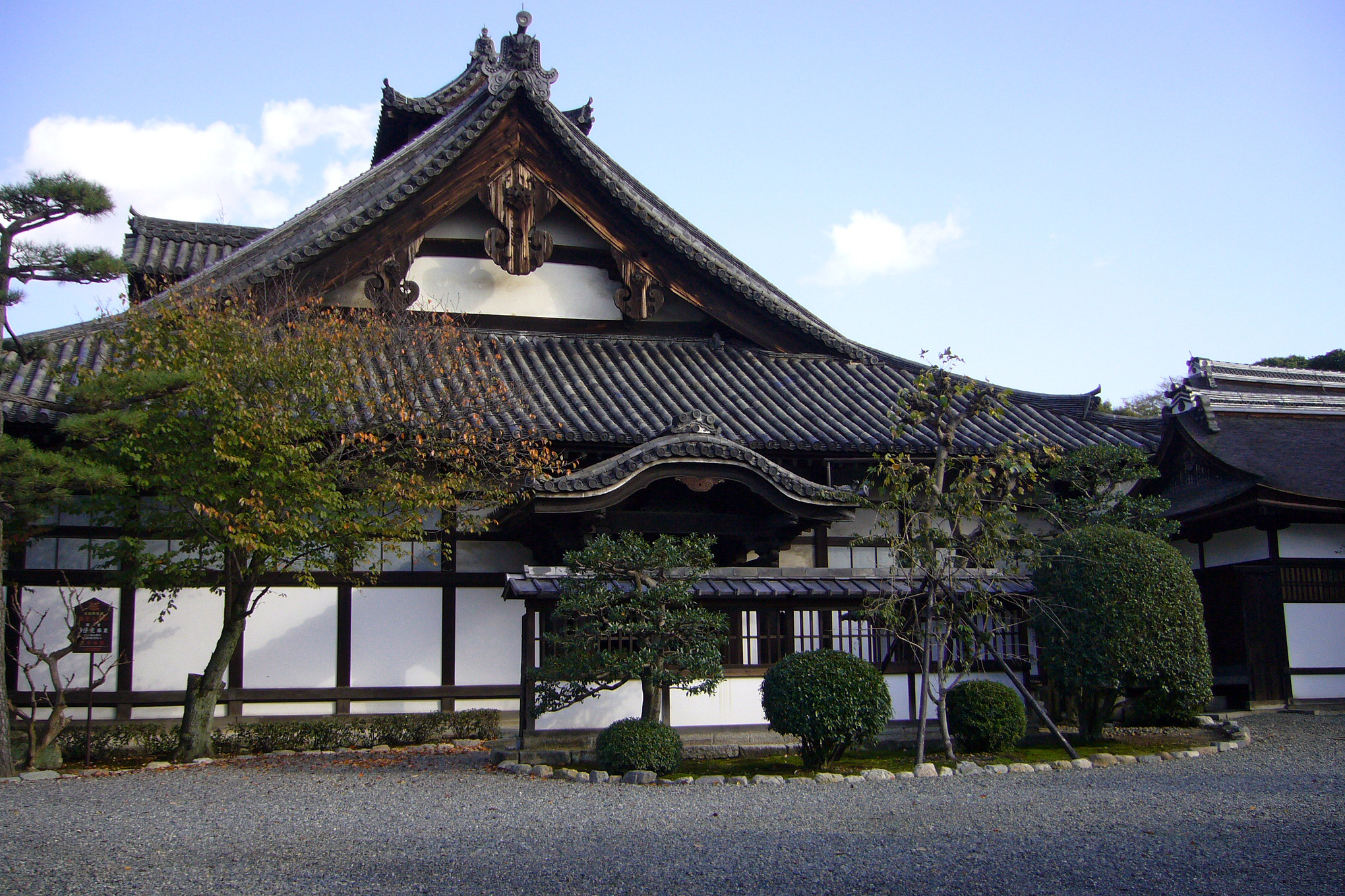 Myohoin in Kyoto, Japan